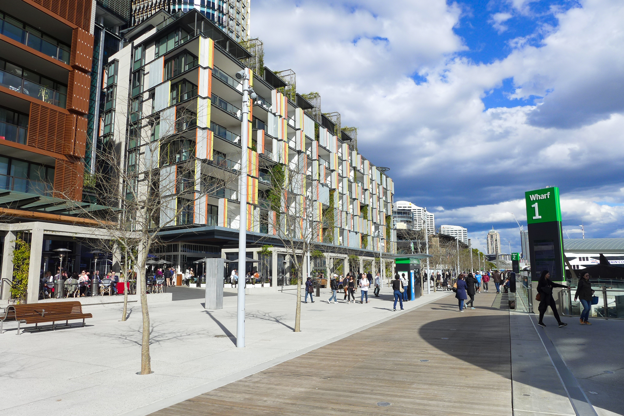 Wulugul Walk